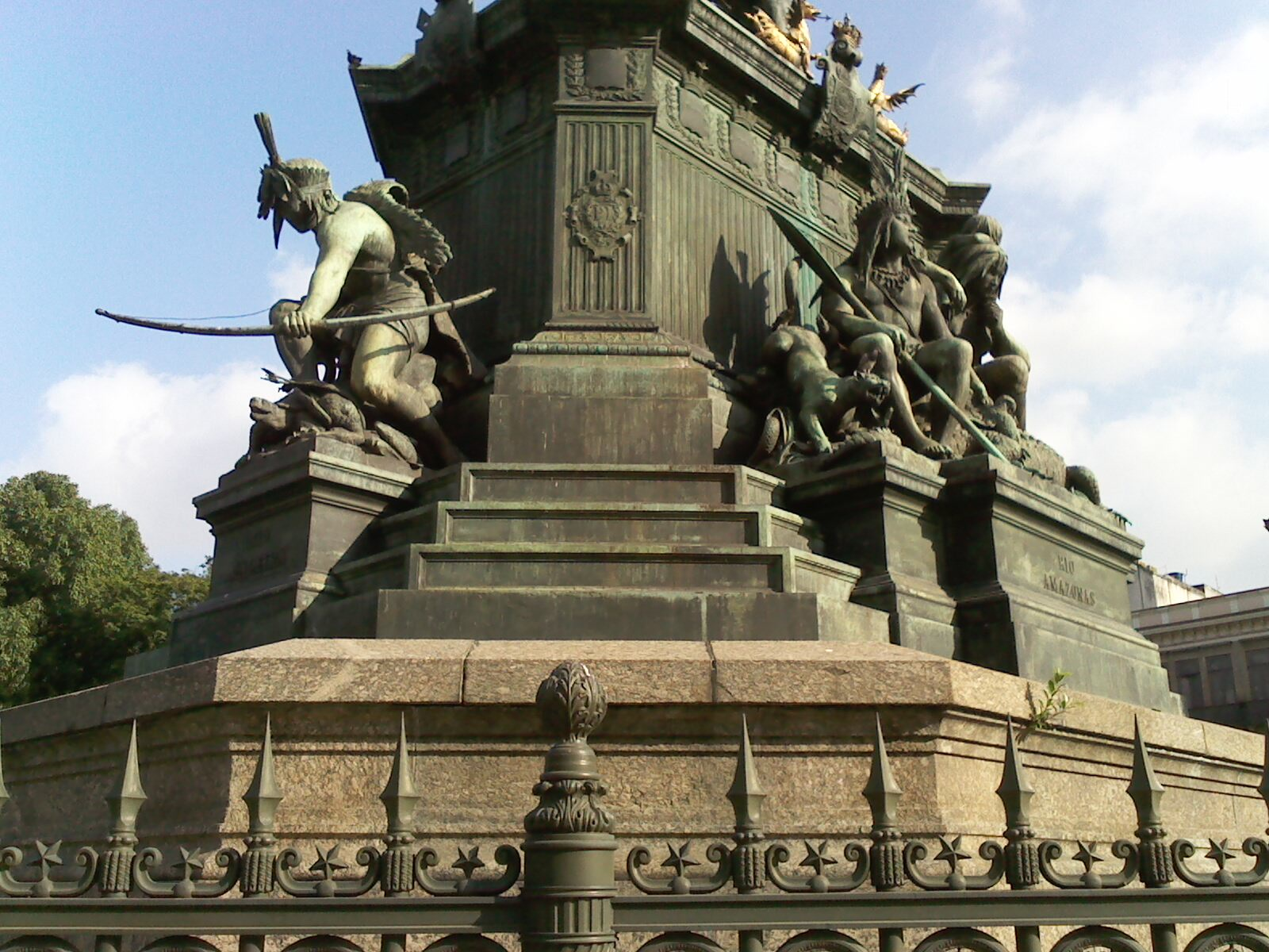 Estátua de D. Pedro I do Brasil, praça Tiradentes, centro histórico do Rio de Janeiro, estado do Rio de Janeiro, Brasil: alegorias aos rios Madeira e Amazonas.